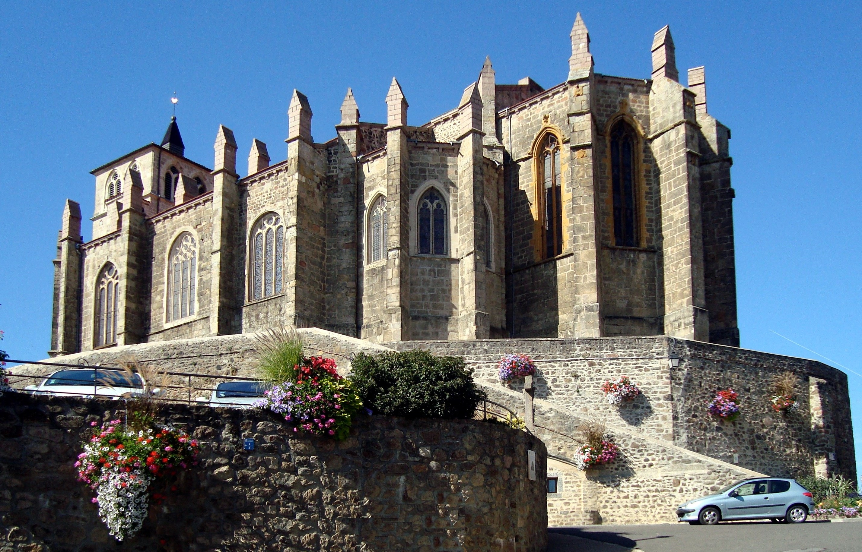 L'église Collégiale du XVème siècle de Saint-Symphorien-sur-Coise, Rhône, France.